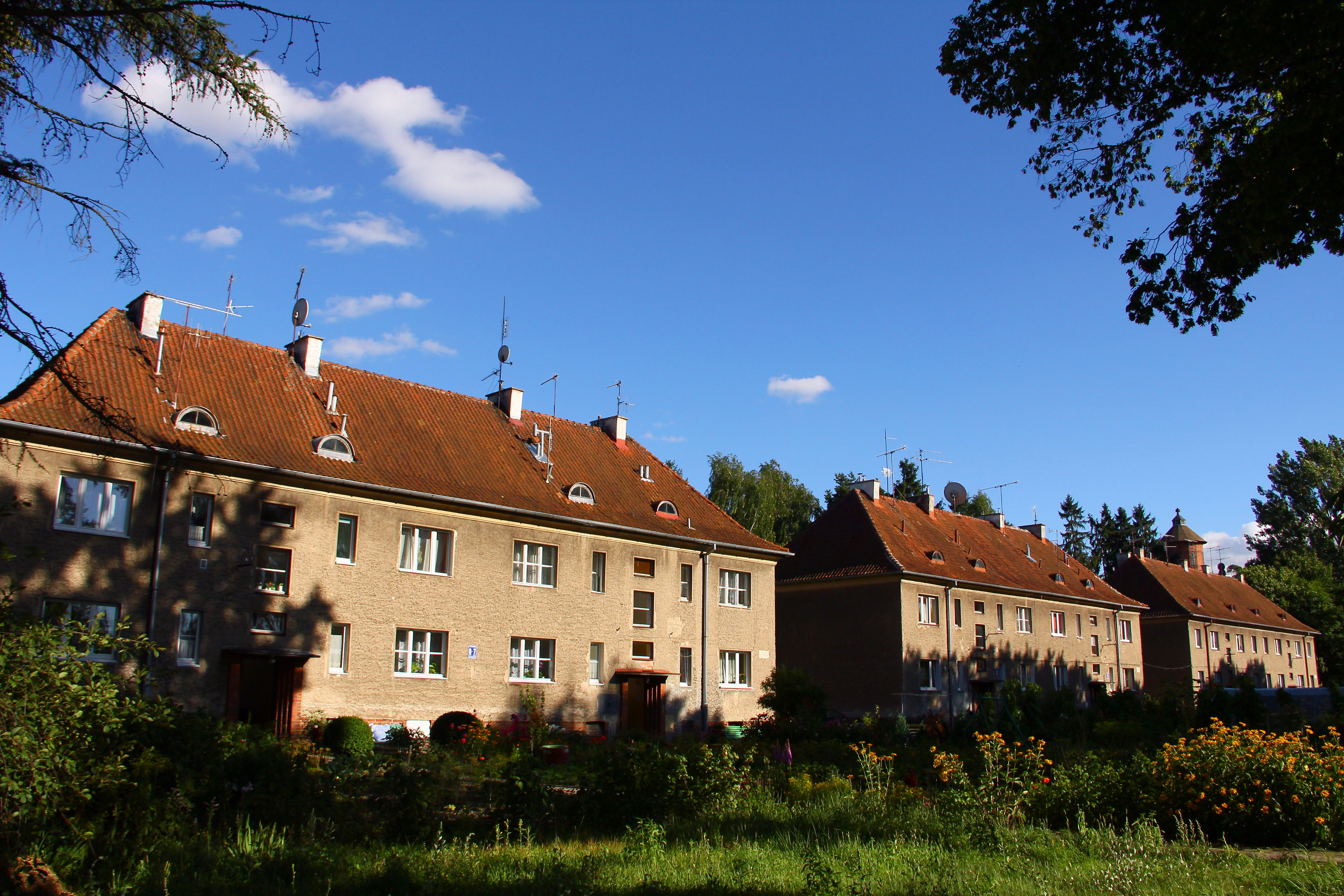 Bartoszyce. Budynki mieszkalne przy ulicy Limanowskiego.